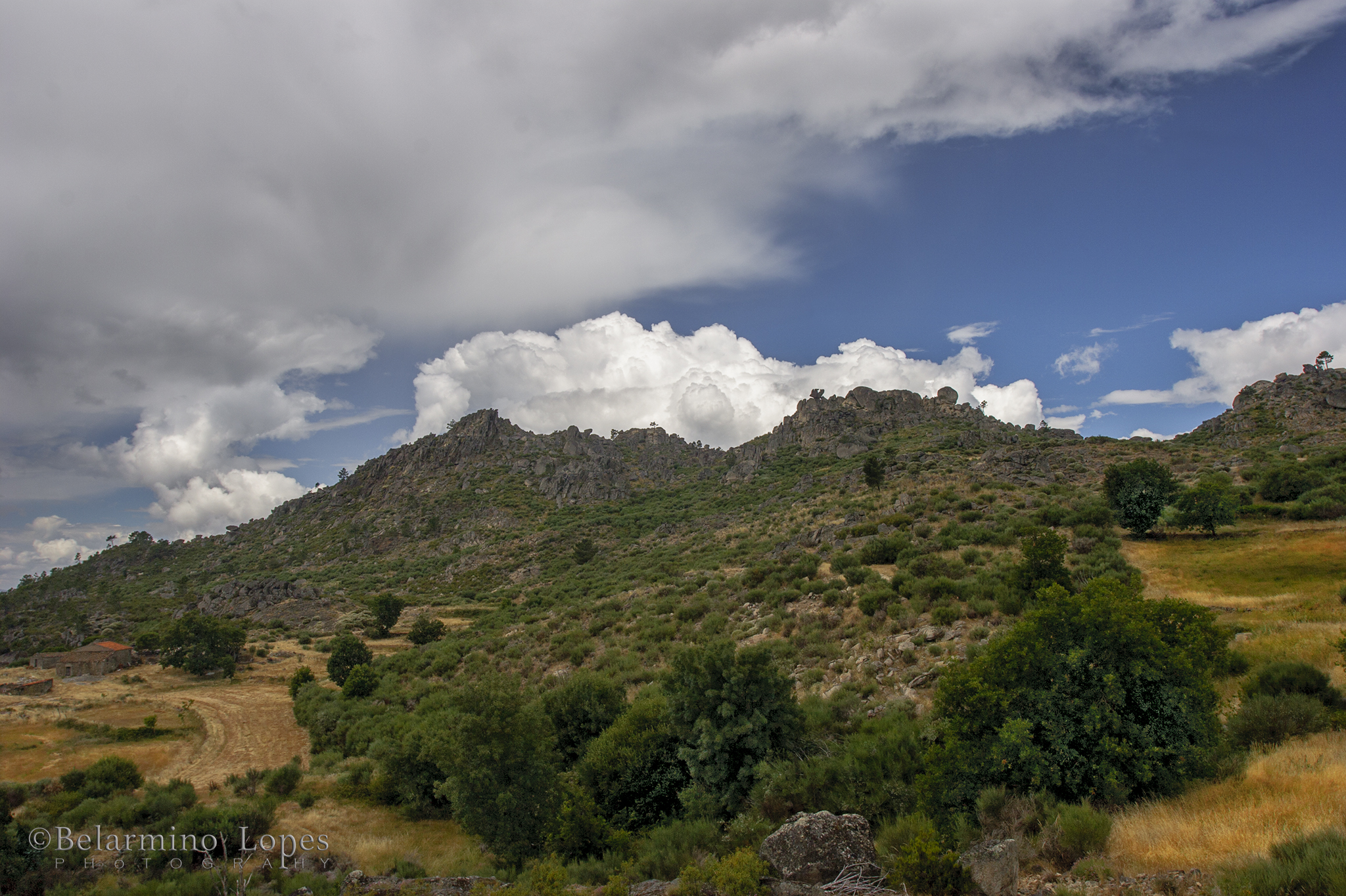 Serra da Gardunha. Vertente Sul, com acesso a partir de Castelo Novo